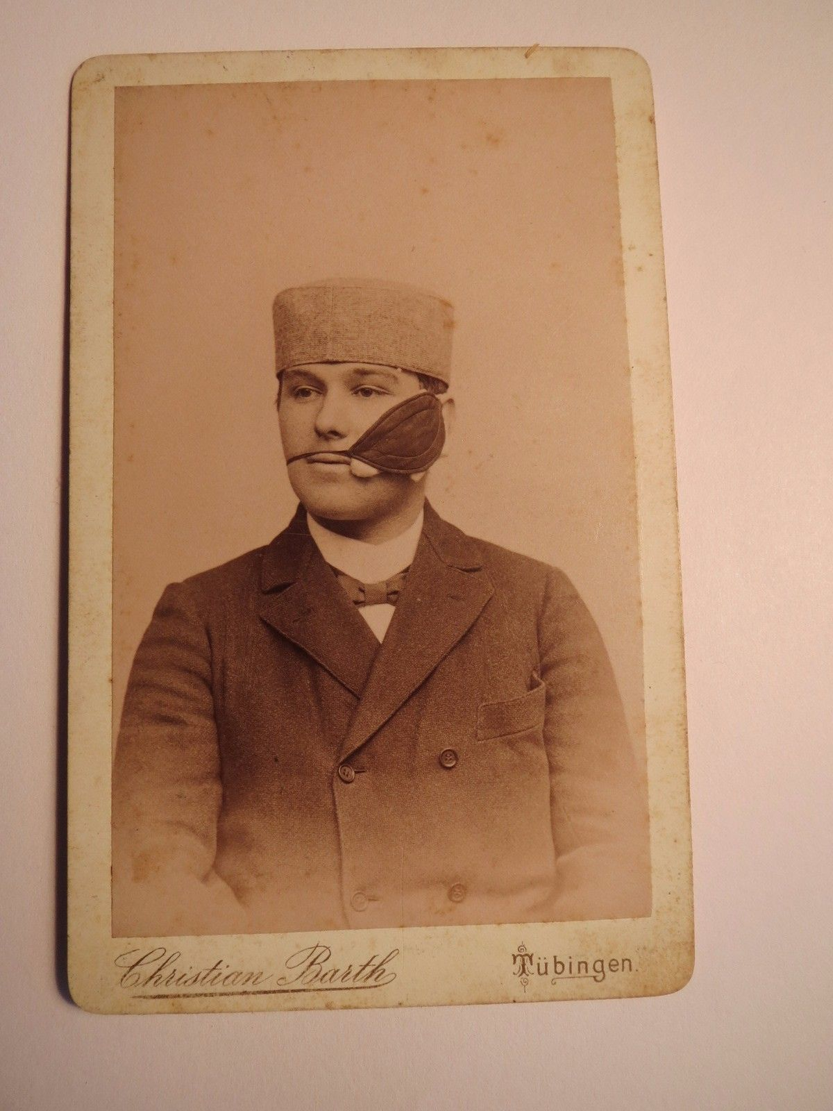 Student Hodrus (?) mit Schmissleder nach Mensur (Tübingen)